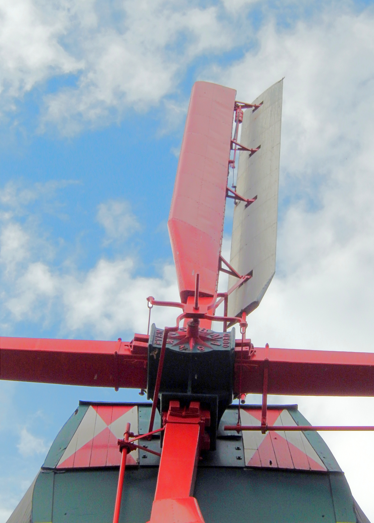 De Hoop, Norg, Bilau wieken